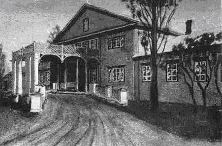 Беларуская (тарашкевіца): Анінск (Aninsk), сядзіба Корсакаў (Korsak)